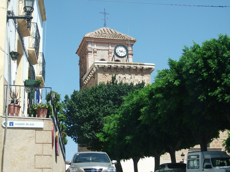 Níjar, Almería